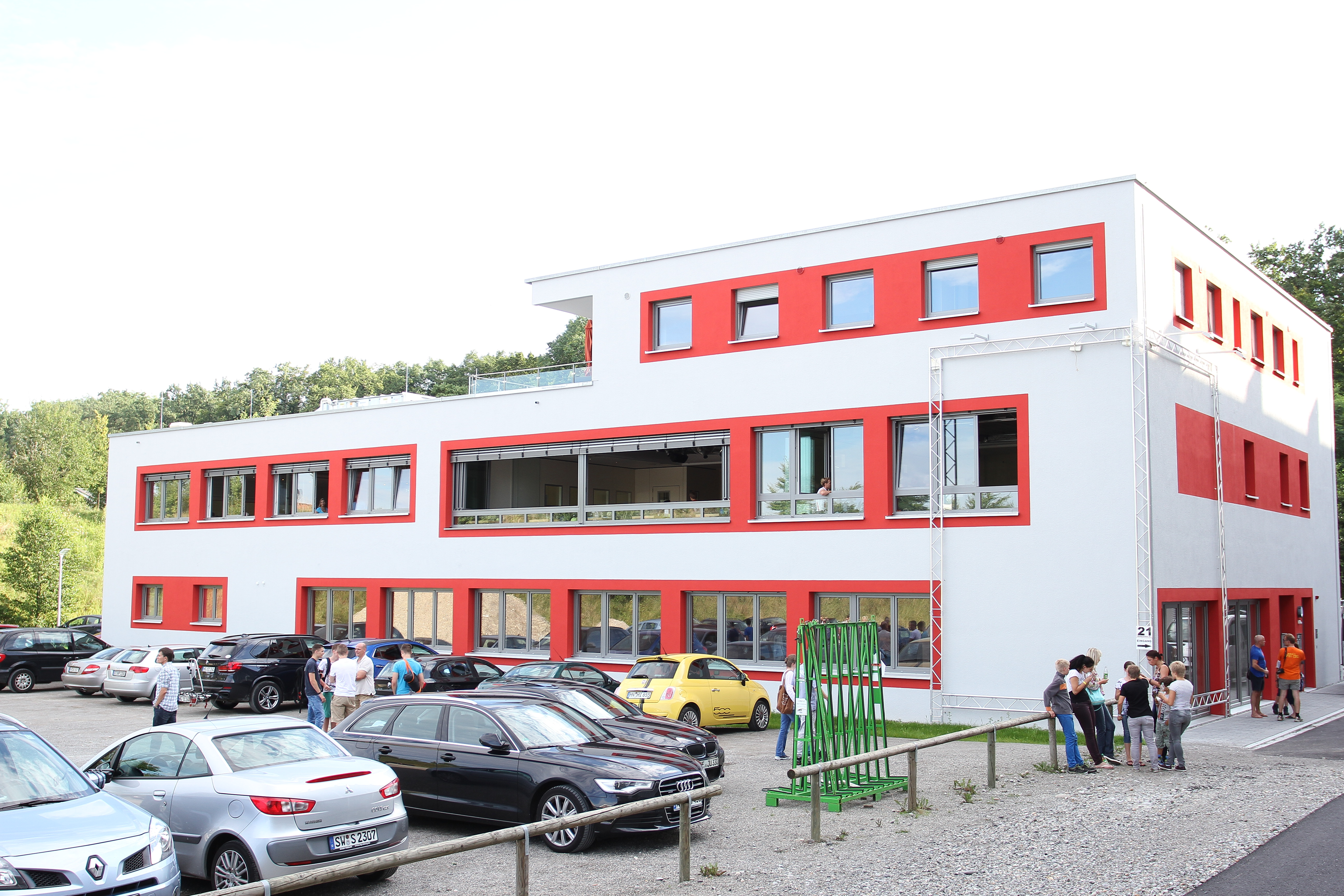 Dojo des Karate Team Bodensee. Eins der größten Karate-Dojos in Deutschland